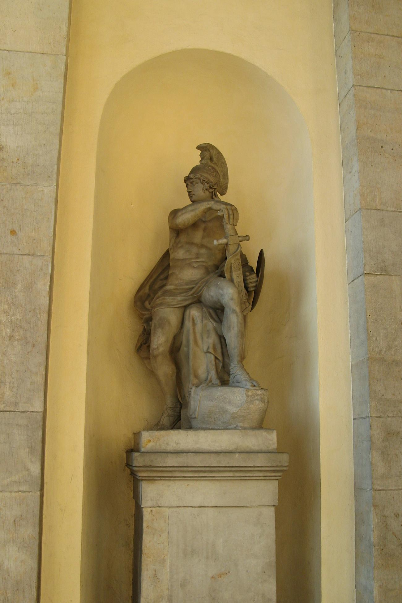 Statue des römischen Kriegsgott Mars am Brandenburger Tor in Berlin. Bildhauer Johann Gottfried Schadow [1]